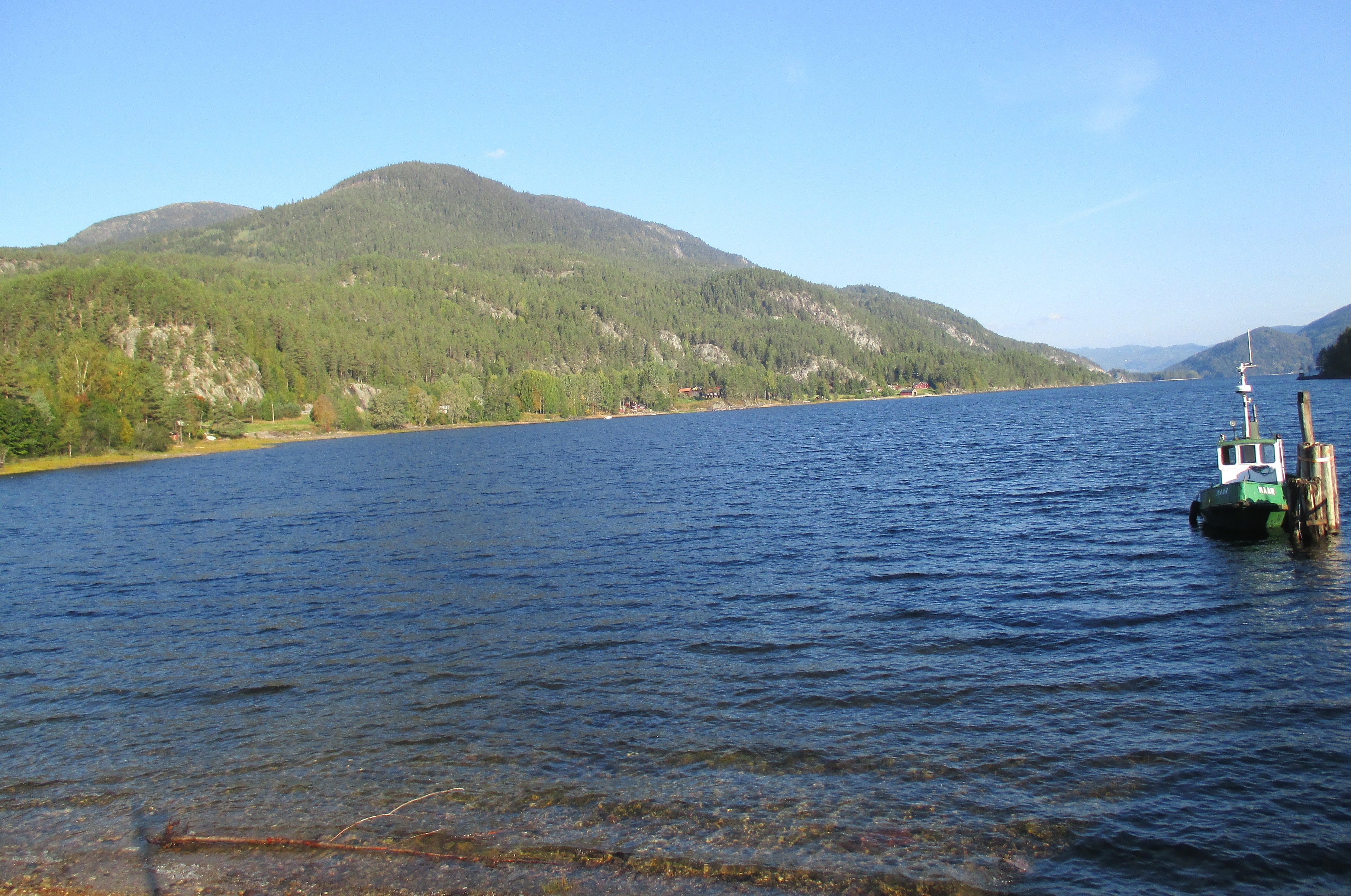 Tinnoset